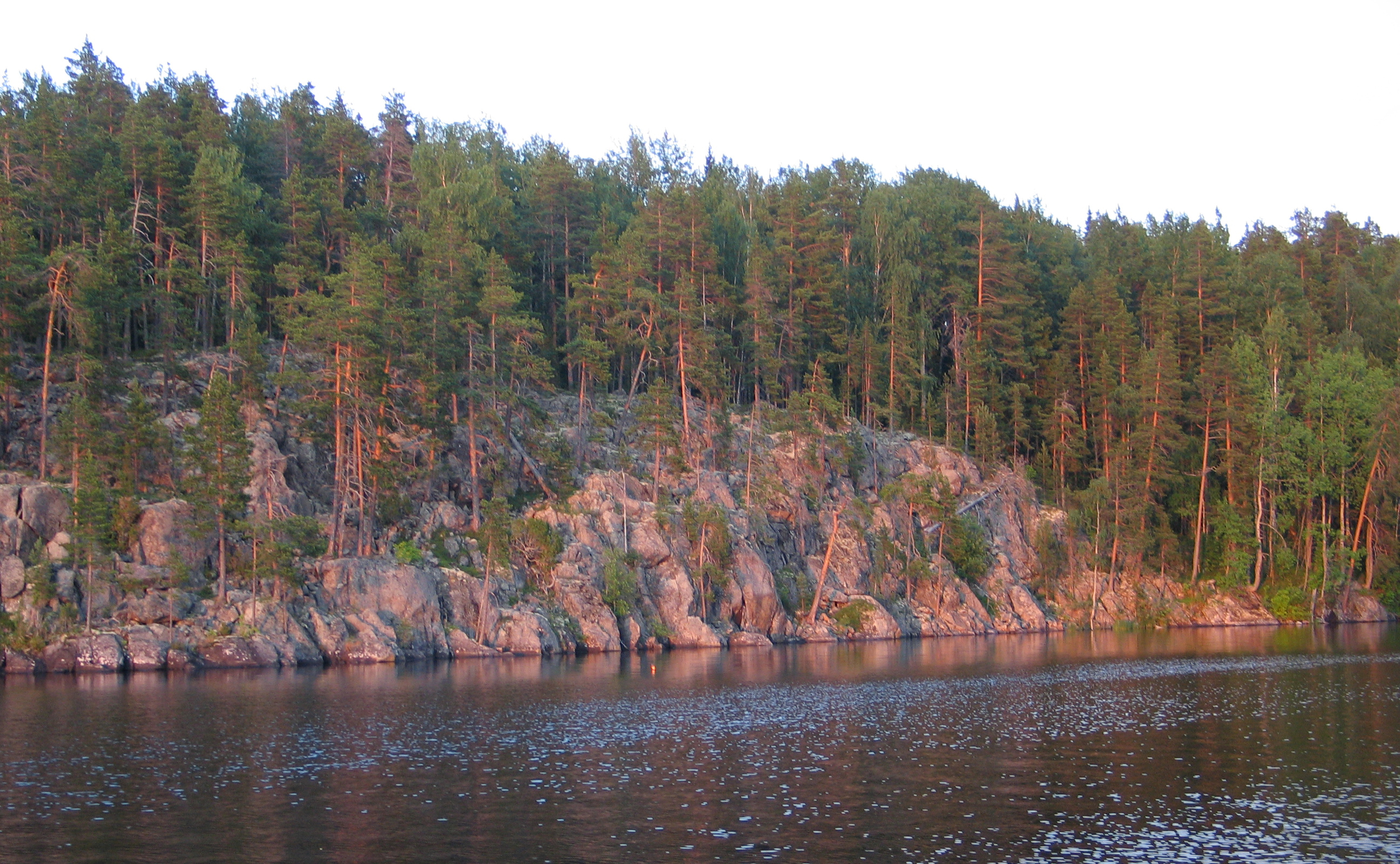 Заказник Ламбасручейский, Медвежьегорский район Восточный берег Уницкой губы. Примечание: Фото в номинациях не участвует. This image is related to the protected area of Russia number 1010080